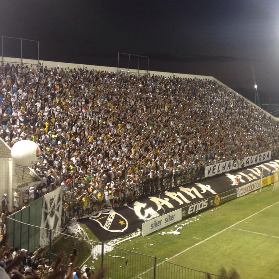 grande massa da Torcida em peso para assistir ao ABC